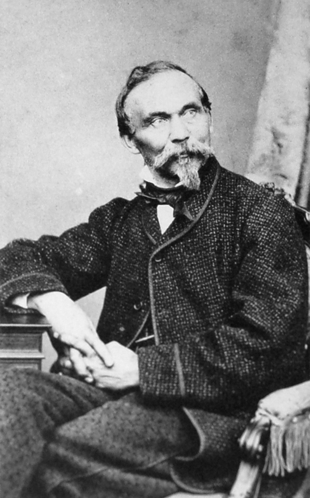 Il fotografo tedesco, trapiantato a Verona, Moritz Lotze (1809-1890). Fu padre del fotografo veronese Richard Lotze (1842-1903).